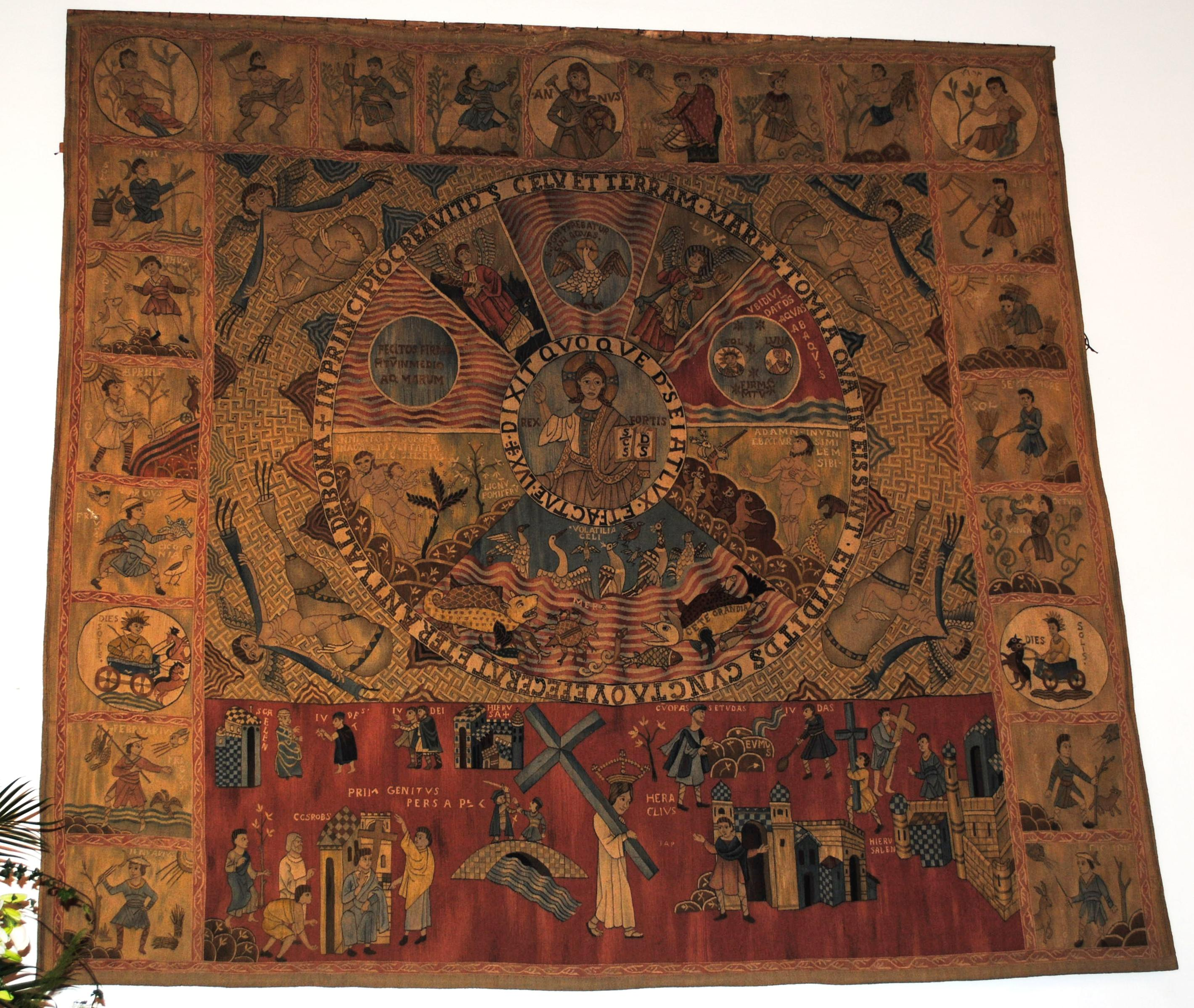 "Copia" del Tapís de la Creació en el altar de la capilla del Parador de Baiona.